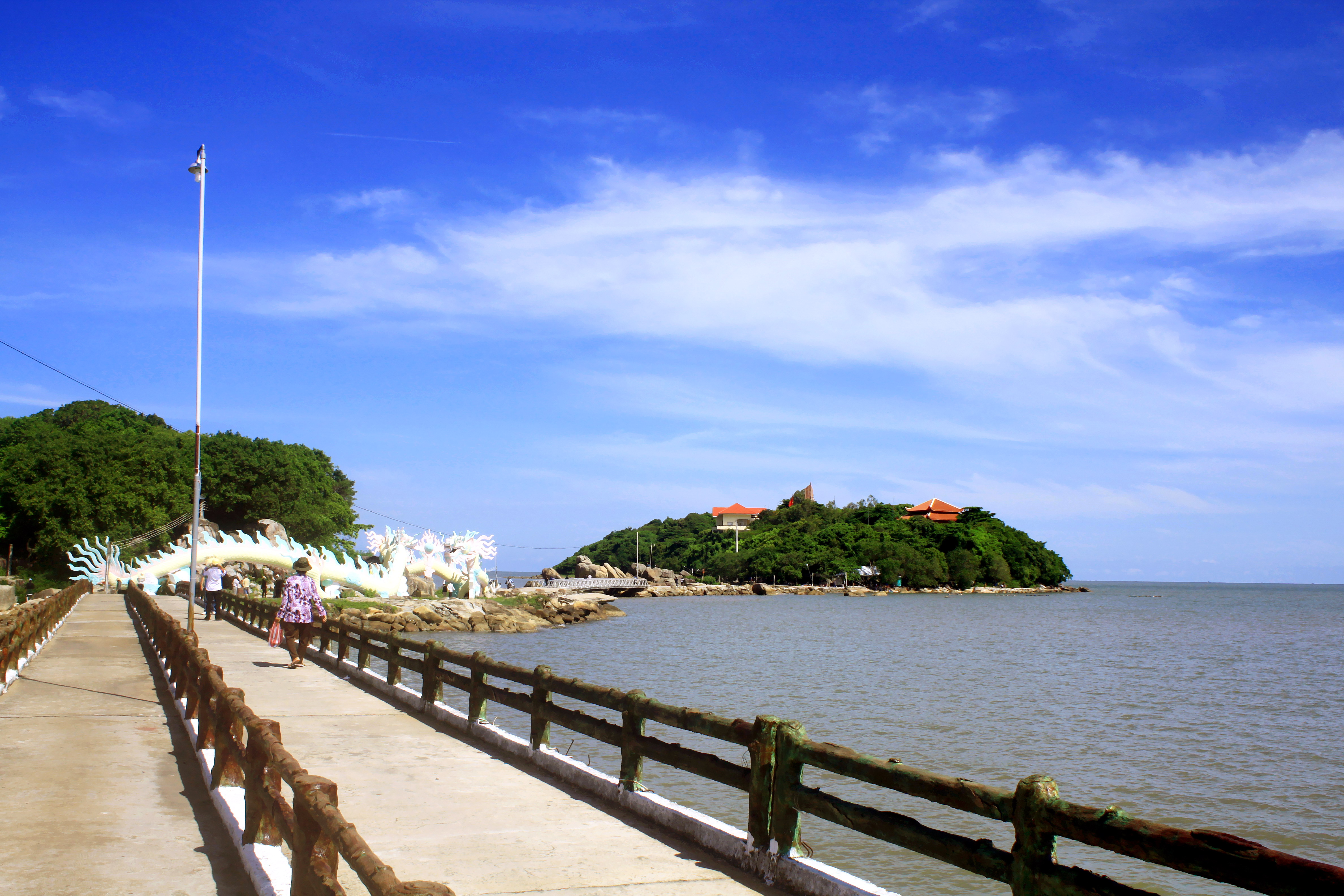 Cầu bê tông dài nối đất liền với Hòn Đá Bạc ở xã Khánh Bình Tây, huyện Trần Văn Thời, tỉnh Cà Mau, Việt Nam.